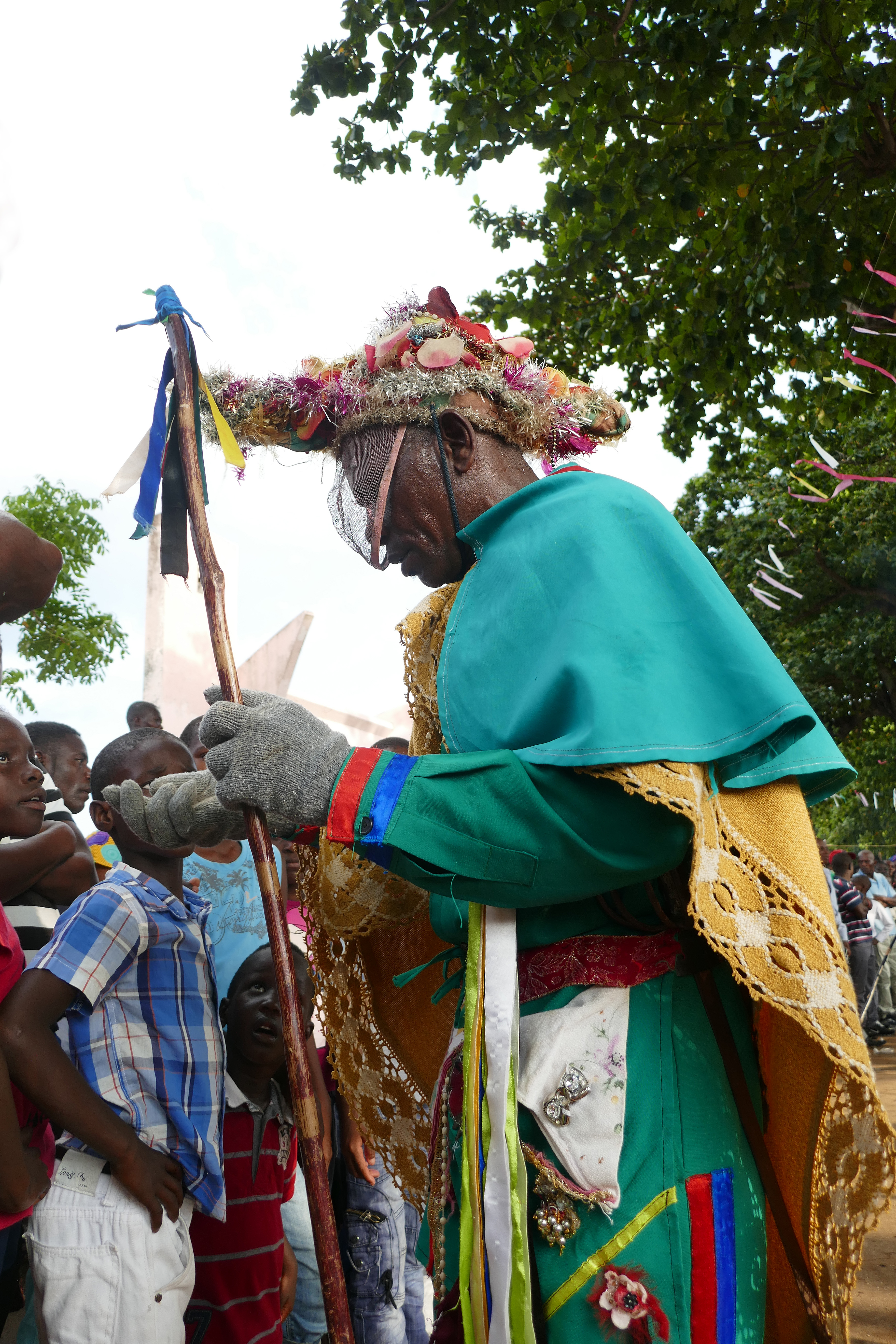 Tchiloli représenté devant l'église São Pedrão de São Tomé à l'occasion de la fête patronale. Le tchiloli est une forme théâtrale, musicale et dansée créée au XVIe siècle, jouée par des pêcheurs et des paysans. Traditionnellement elle met en scène la seule pièce du répertoire, La tragédie du marquis de Mantoue et de l'empereur Charlemagne". This is an image with the theme "Play" from: Sao Tome and Principe